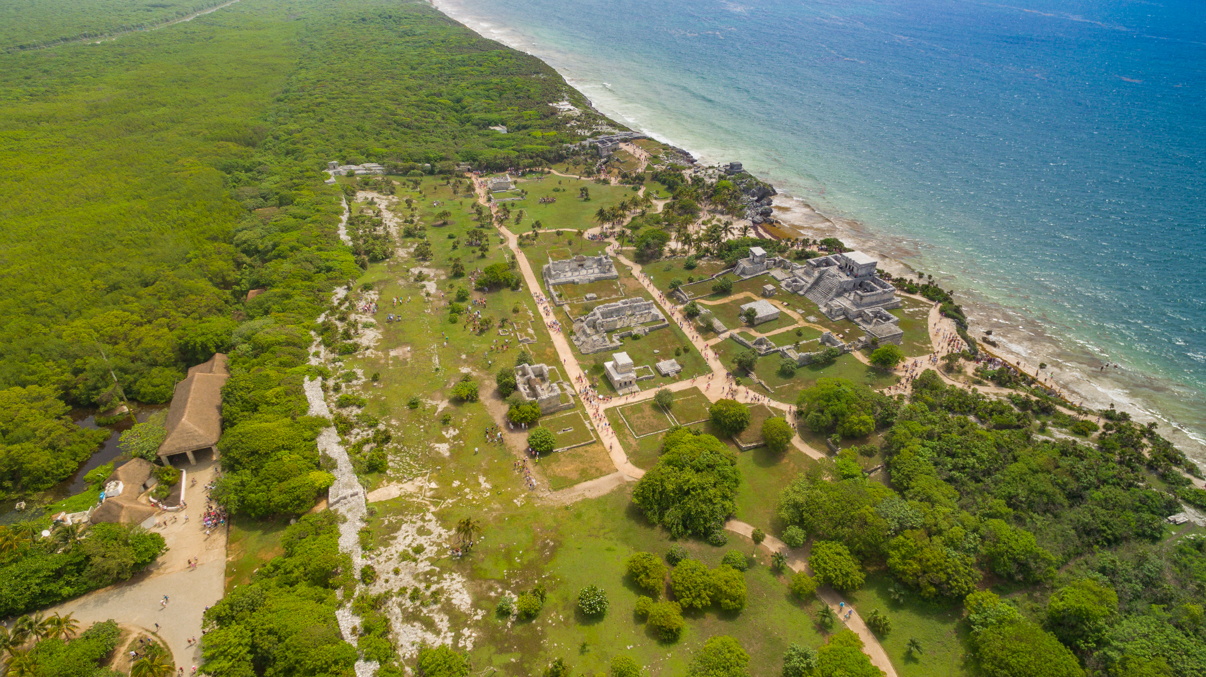 Tulum